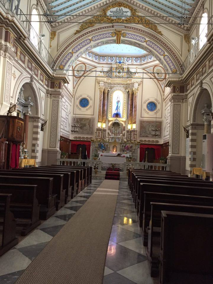 St. Maria Kilisesi iç mekan